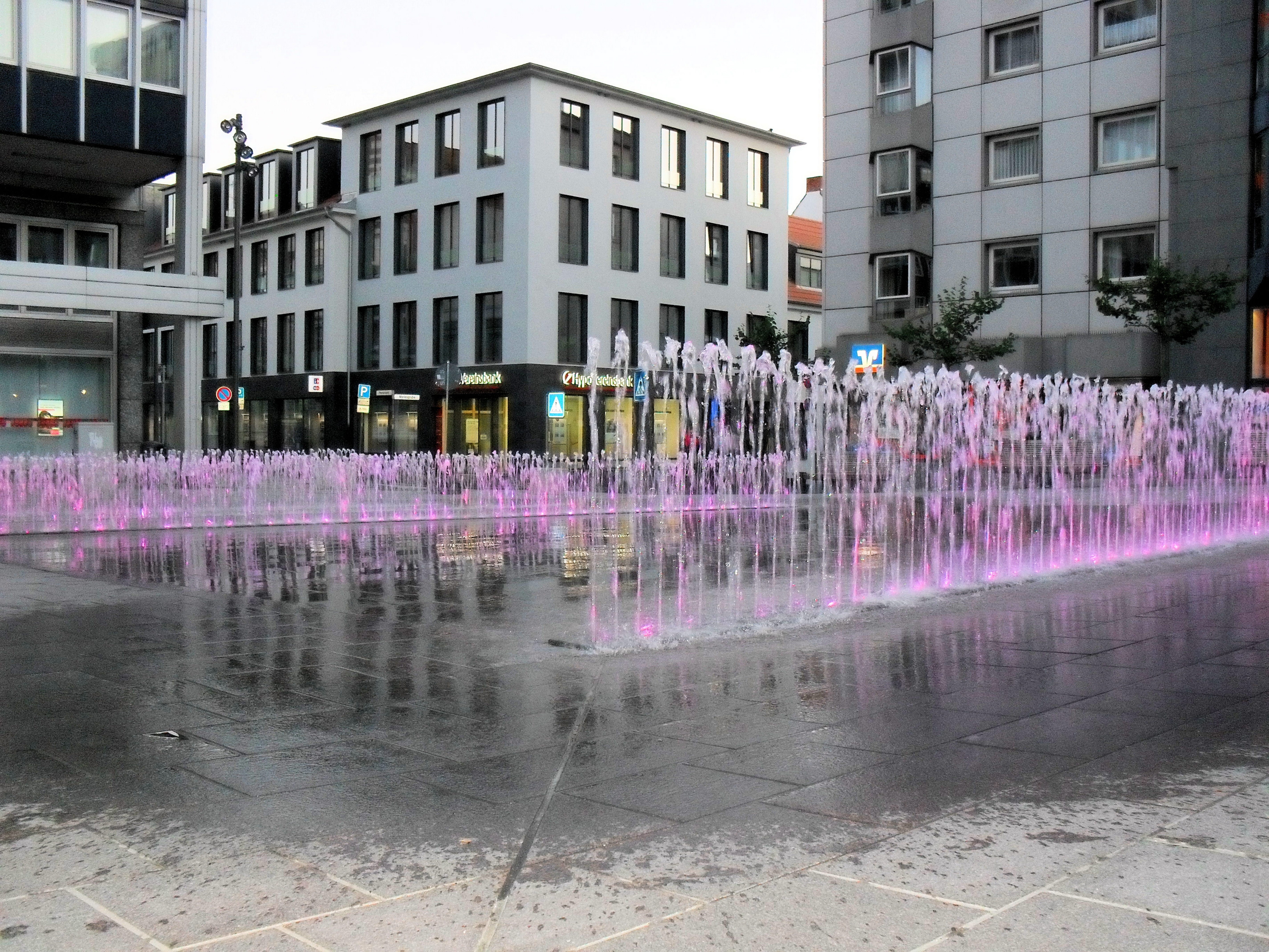 Die zum Abend beleuchteten Wasserspiele auf dem Klingenberg in Lübeck